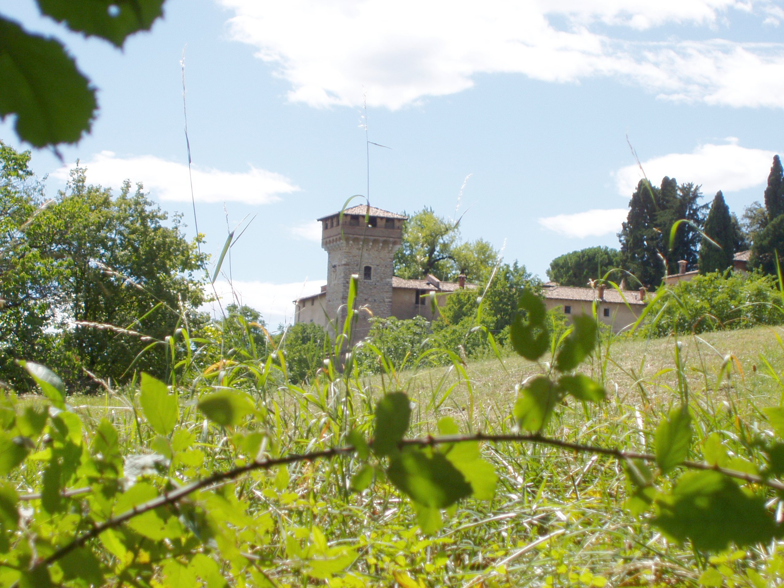 Castello di Frascarolo - Induno Olona, Varese, Lombardia, Italy